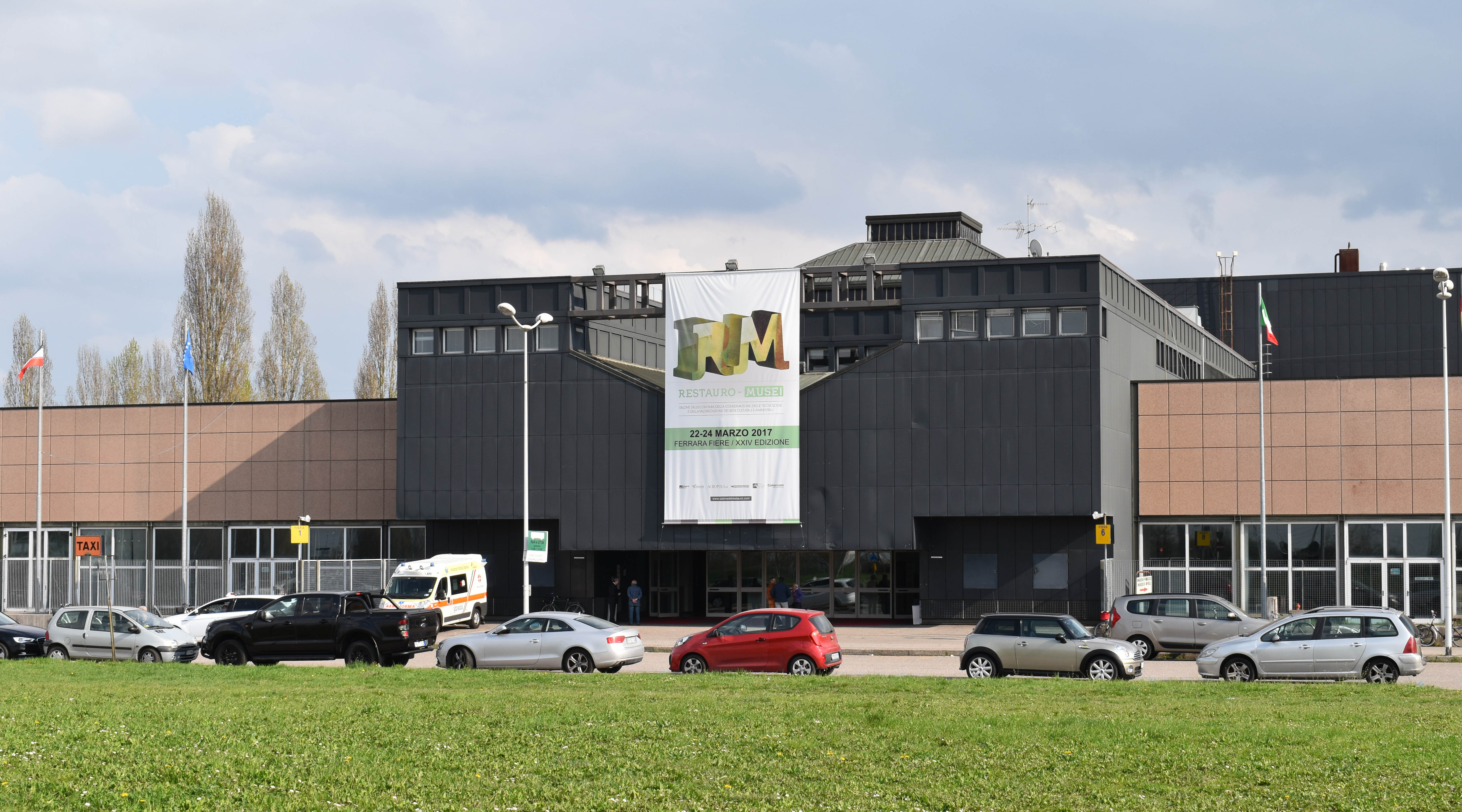 Entrata Fiera di Ferrara. Salone Restauro Musei